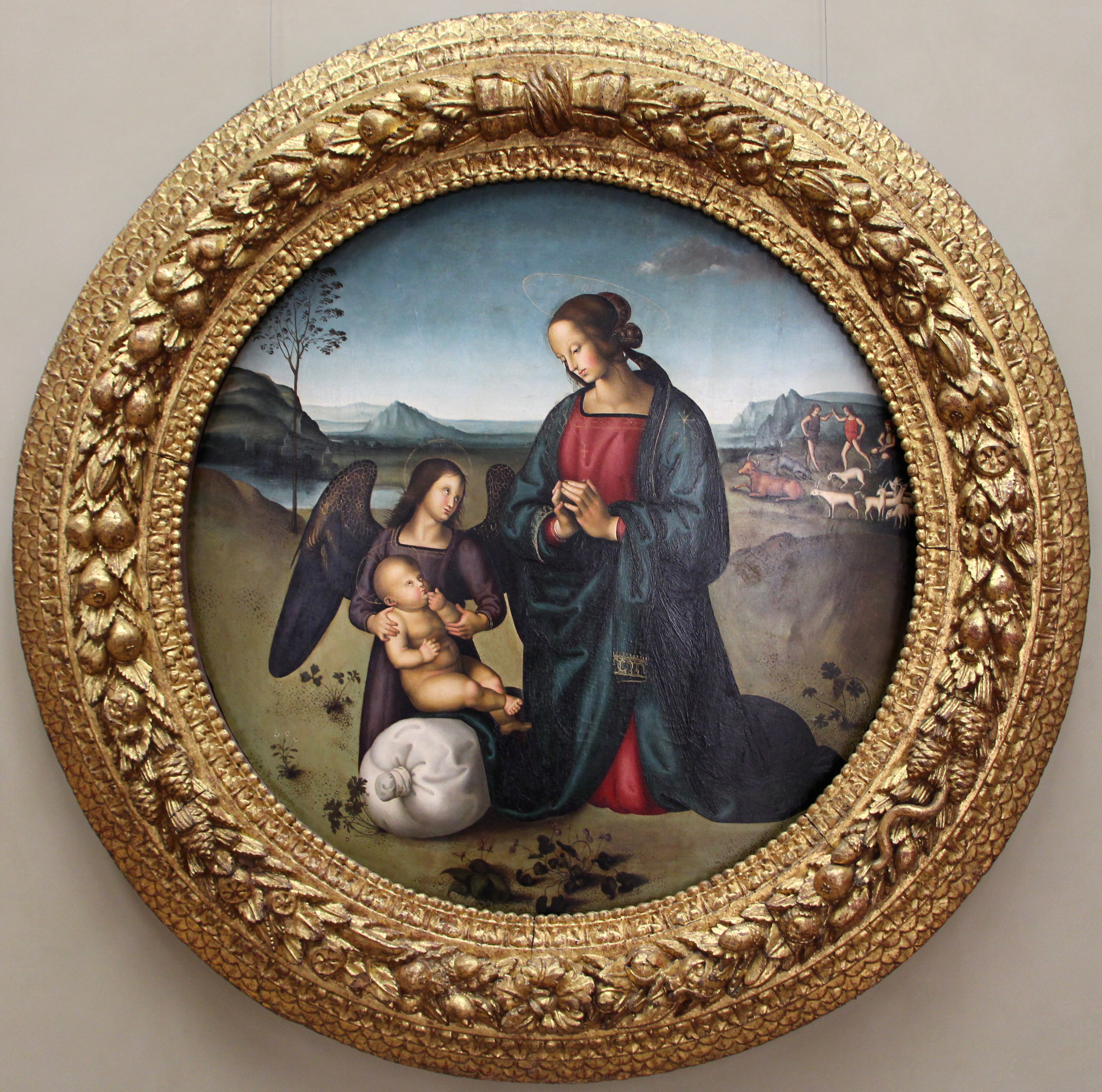 Galleria G. Franchetti alla Ca' d'Oro - MIBAC The making of this document was supported by Wikimedia CH. (Submit your project!) For all the files concerned, please see the category Supported by Wikimedia CH. This is a photo of a monument which is part of cultural heritage of Italy.